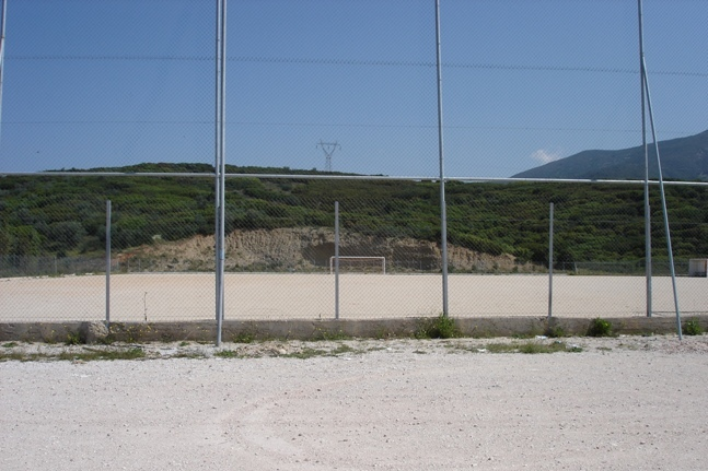 Vasiliko Groud Achaea Greece Γήπεδο Βασιλικού Αχαΐας